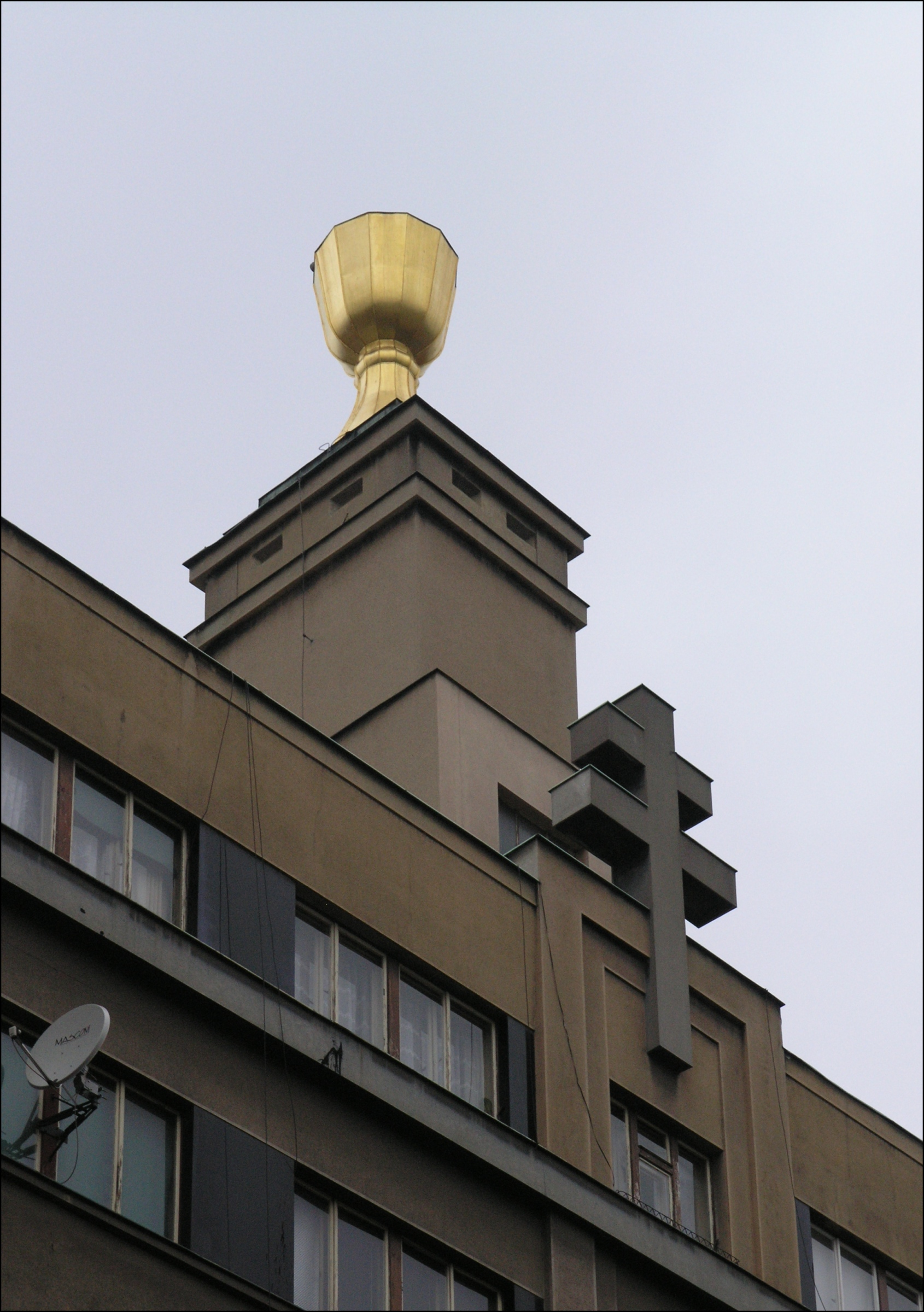 Husův sbor ve Farského ulici